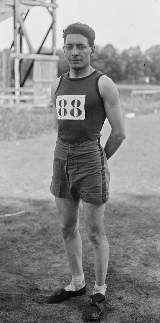 Prix Blanchet, M. Delvart, gagnant du 400 [m]